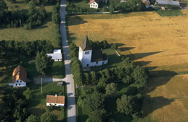 Kyrkan från syd. Motiv: Akebäcks kyrka Nyckelord: Flygbilder, Riksintressen Kategori: KyrkomiljöKyrkan från syd.